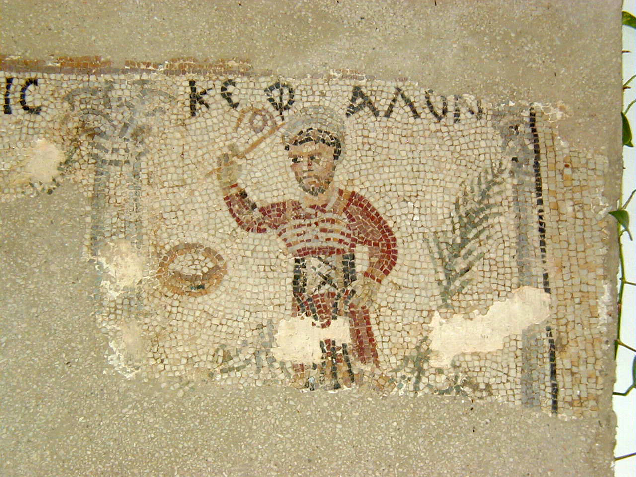 Musee paleochretien Carthage mosaique inscriptions grecques 4